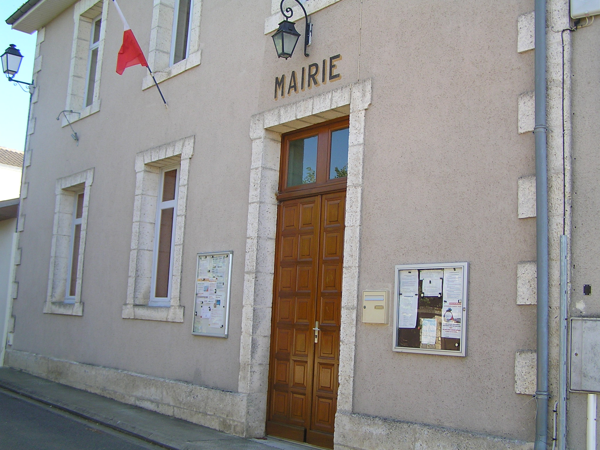 mairie d'Ebréon